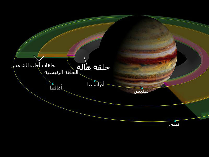 حلقات المشتري.تصنيف:المشتري